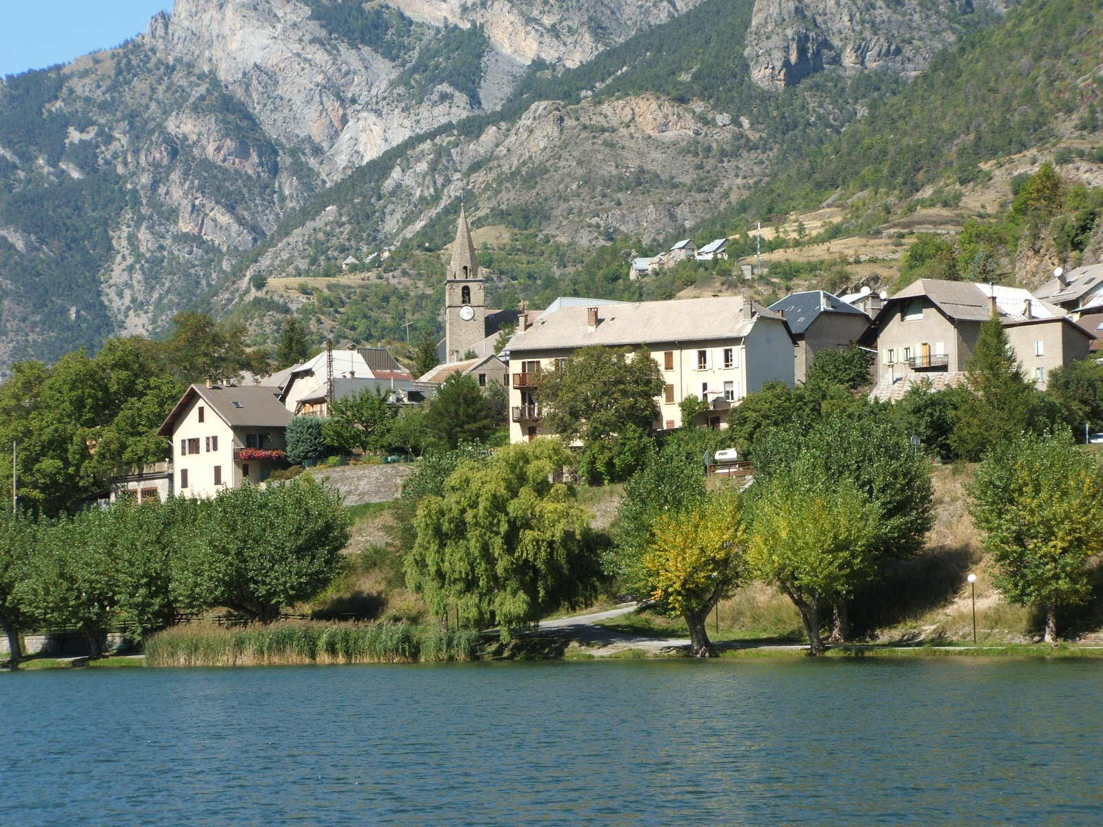 Le Lauzet-Ubaye, département des Alpes-de-Haute-Provence, France